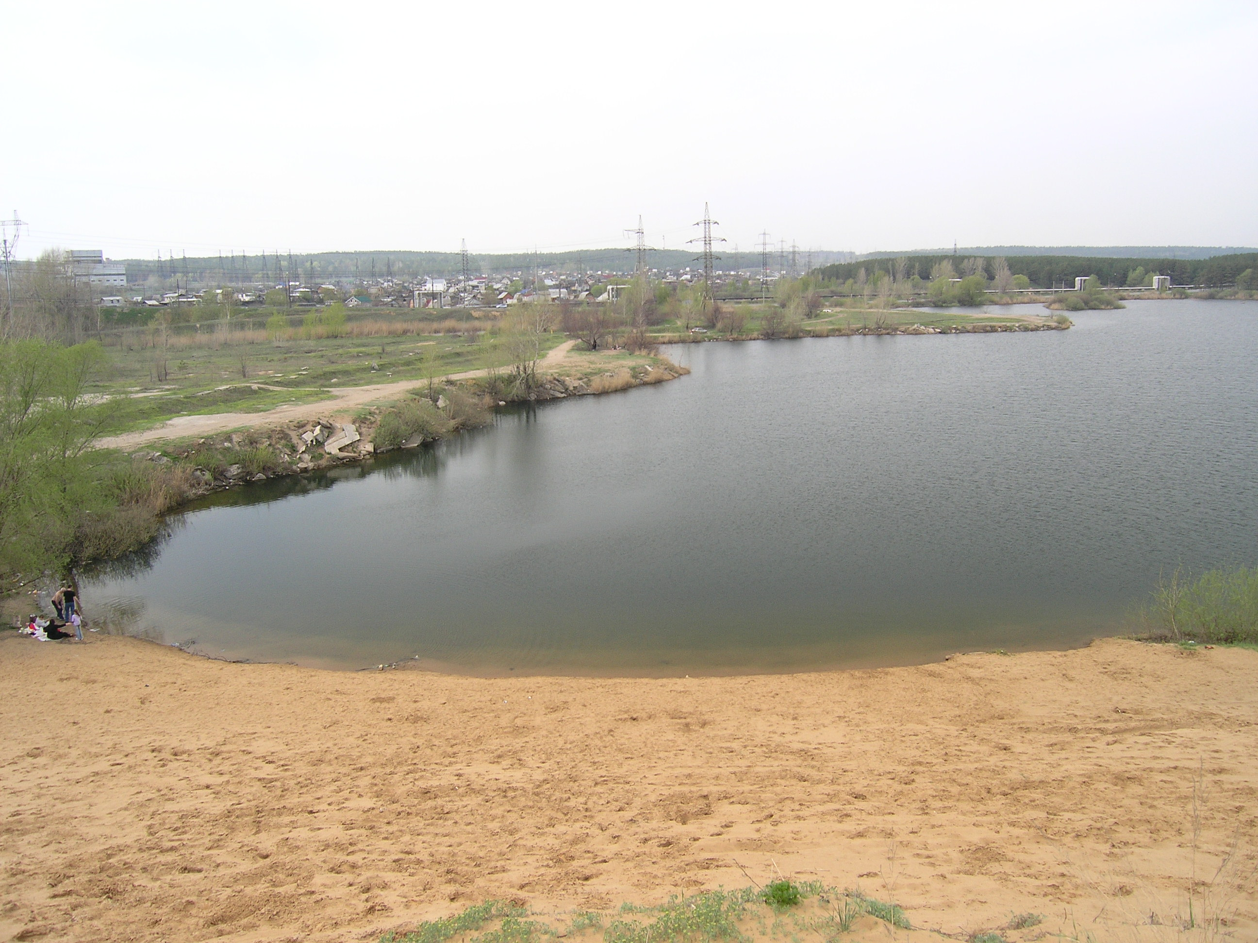 Озеро Пляжное, Тольятти, Россия